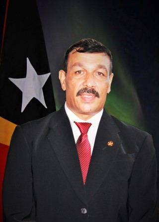 Longuinhos Monteiro